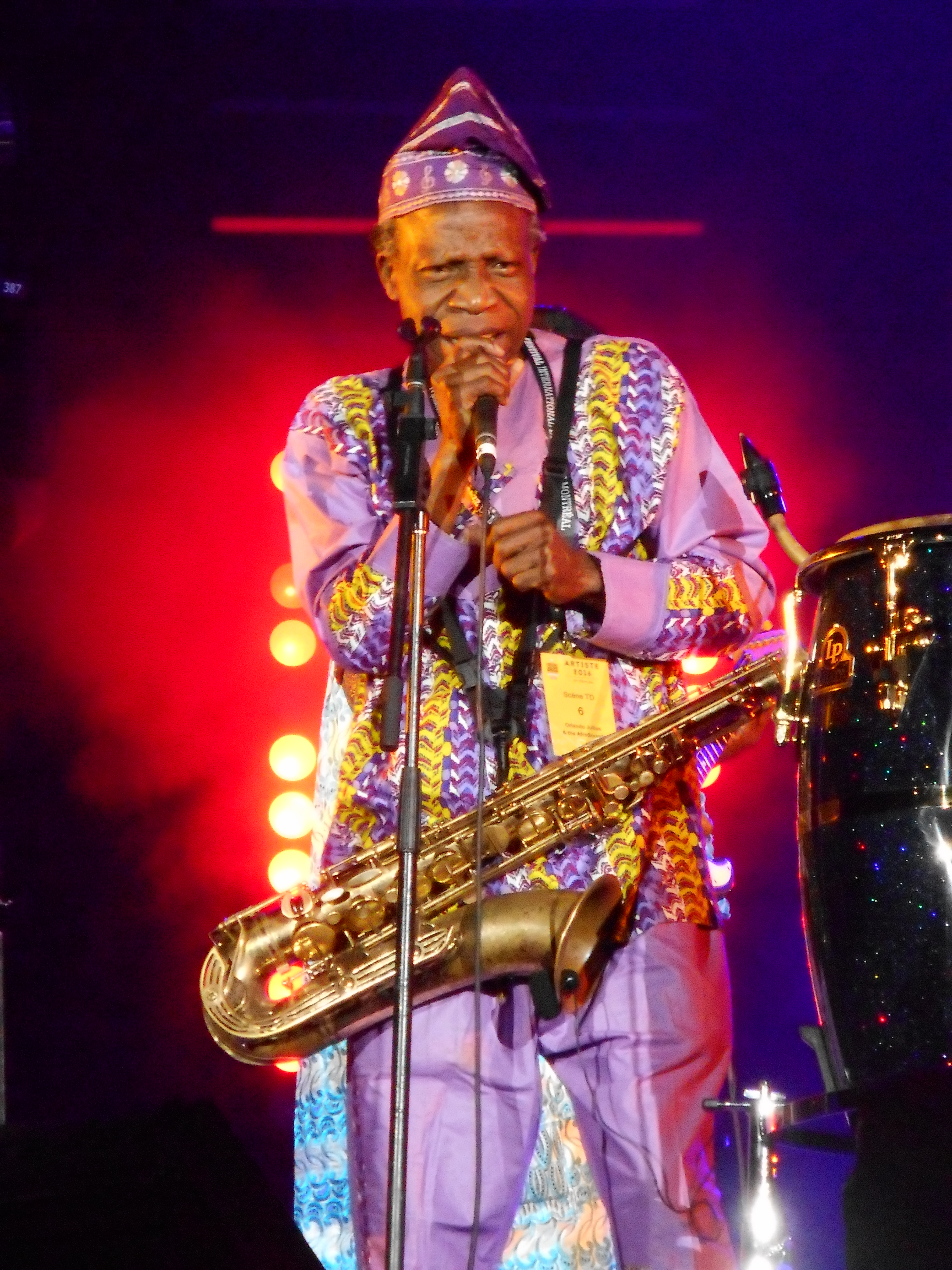 Spectacle de Orlando Julius & The Afrosoundz, le 6 juillet 2016, à la place des Festivals, dans le cadre du Festival international de jazz de Montréal